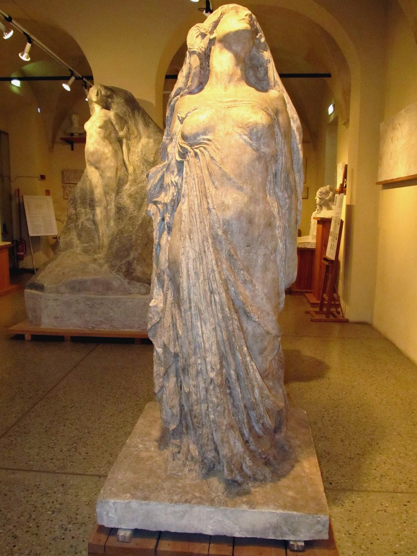 l'opera in gesso di Leonardo Bistolfi nella prima sala dell'omonima gipsoteca di Casale Monferrato